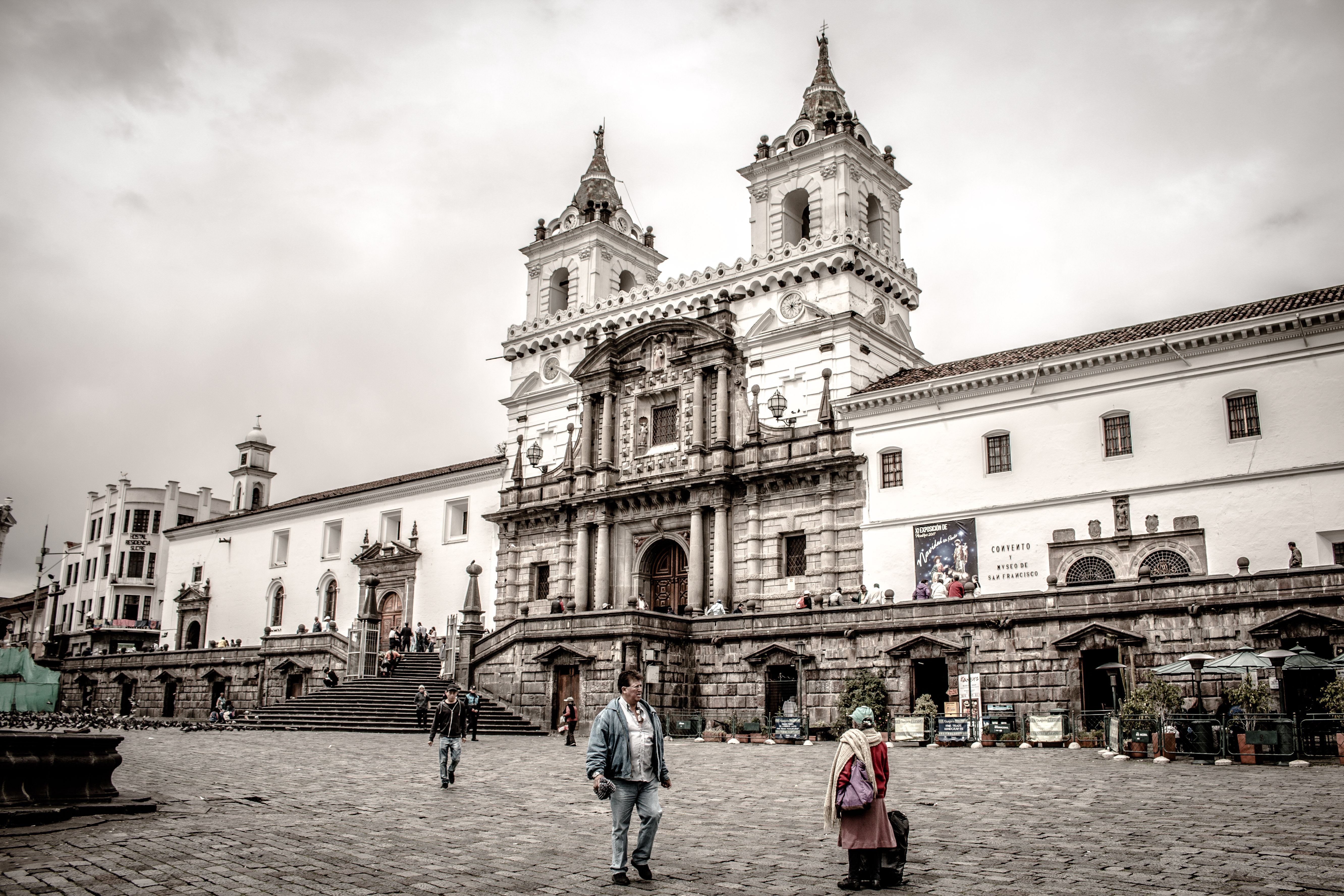 Vista de la Iglesia de San Francisco en Quito desde la plaza.